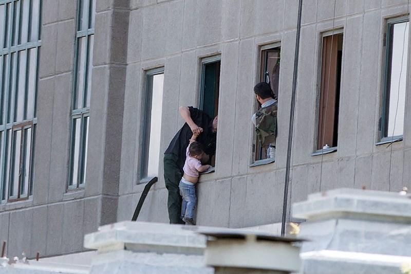 حمله تروریستی مجلس شورای اسلامی